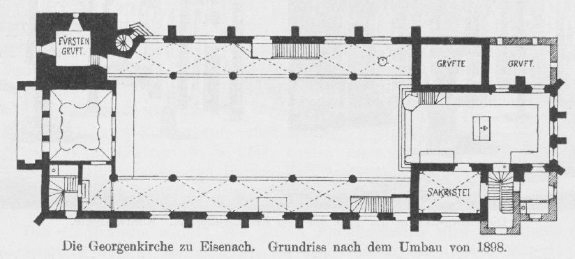 Grundriss-Plan der Georgen-Kirche in Eisenach - zum Artikel v. H. Helmboldt.